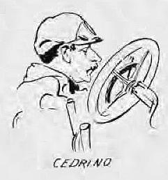 Emanuel Cedrino à la Coupe Vanderbilt 1905 (Allgemeine Automobil-Zeitung - 1905, dessin Georges Goursat, alias Sem)